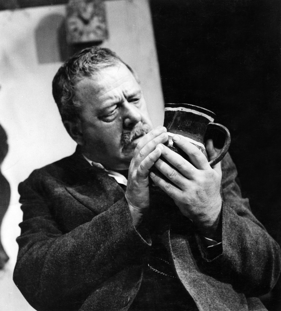 Ivan Potrč, Krefli, SNG v Mariboru. Na fotografiji: Arnold Tovornik (Jura Krefl).